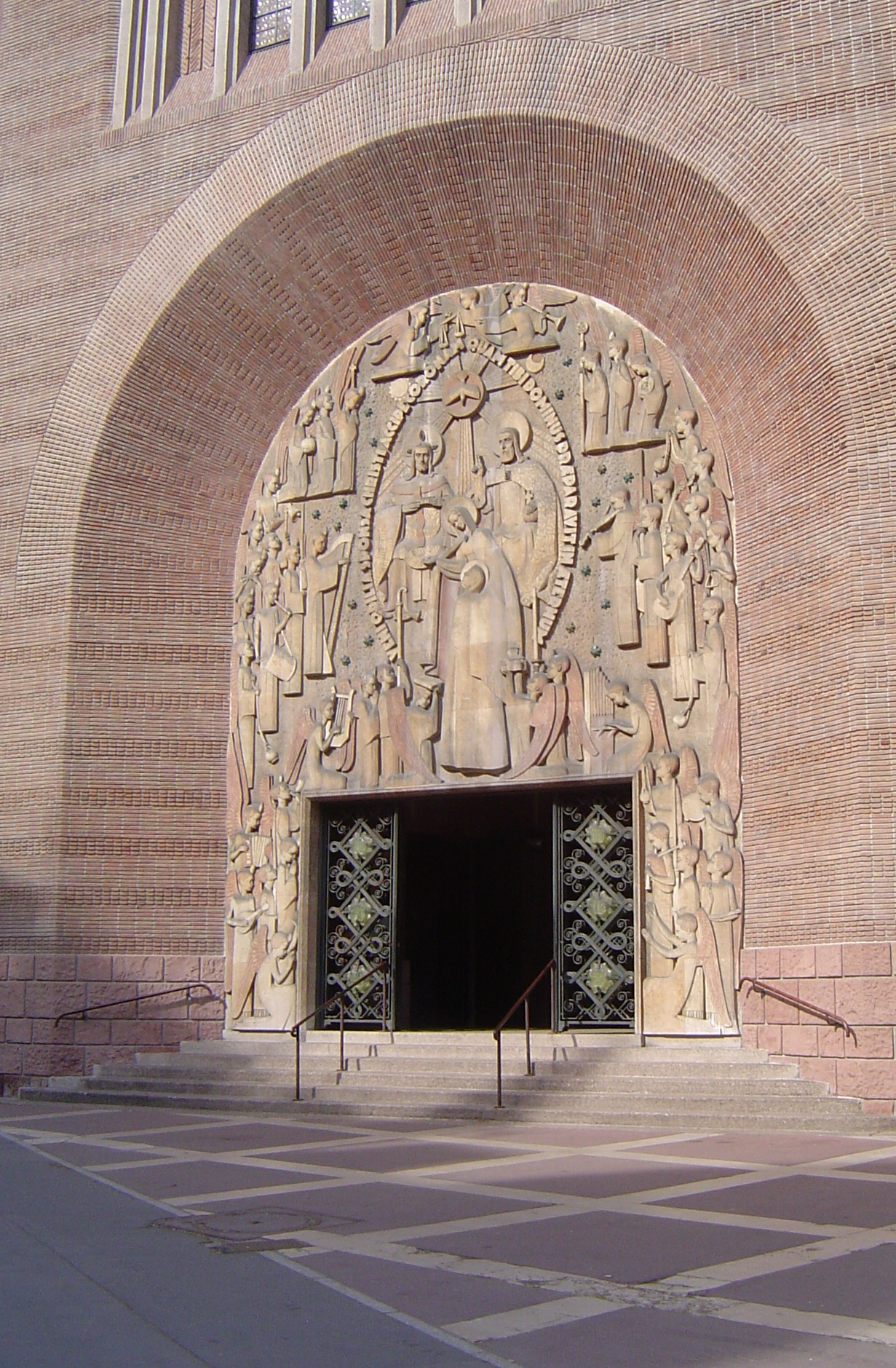 Photos prises à Paris